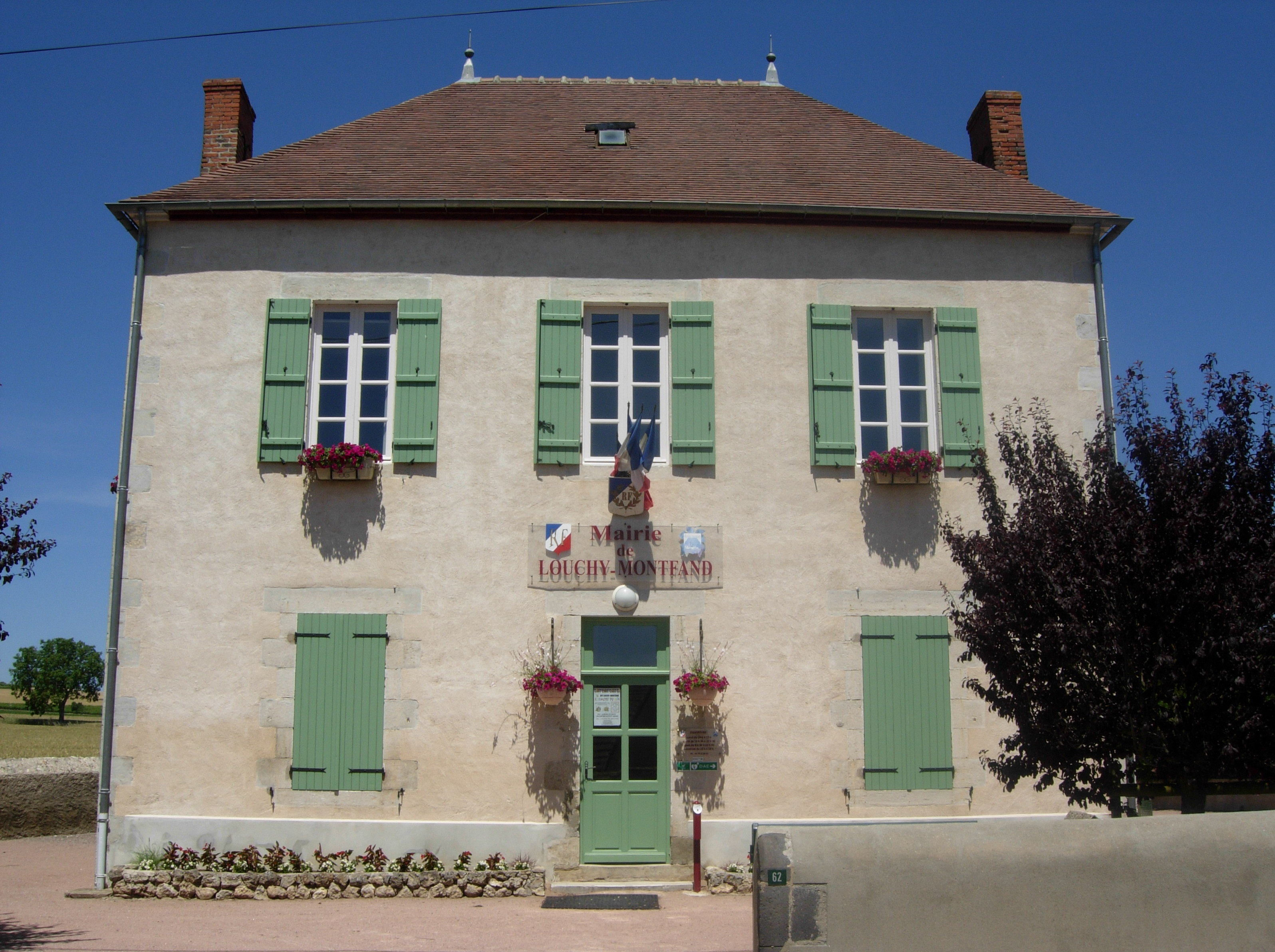 Une photo de la mairie de Louchy-Montfand vue de l'extèrieur